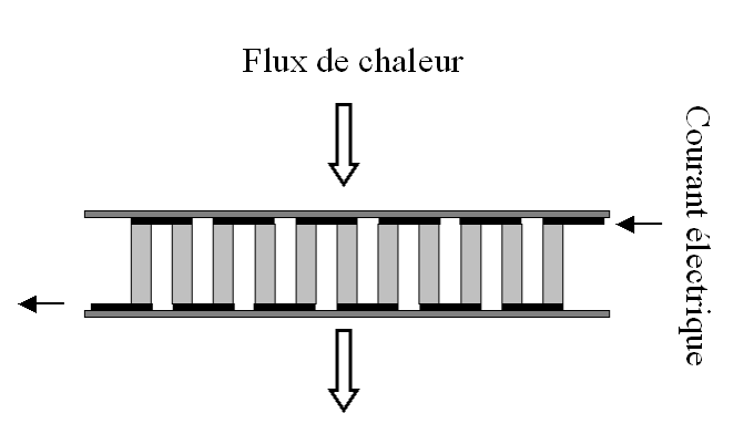 Schéma de module thermoélectrique constitué de plusieurs couples. dessin réalisé par Utilisateur:David Berardan Utilisateur:David Berardan